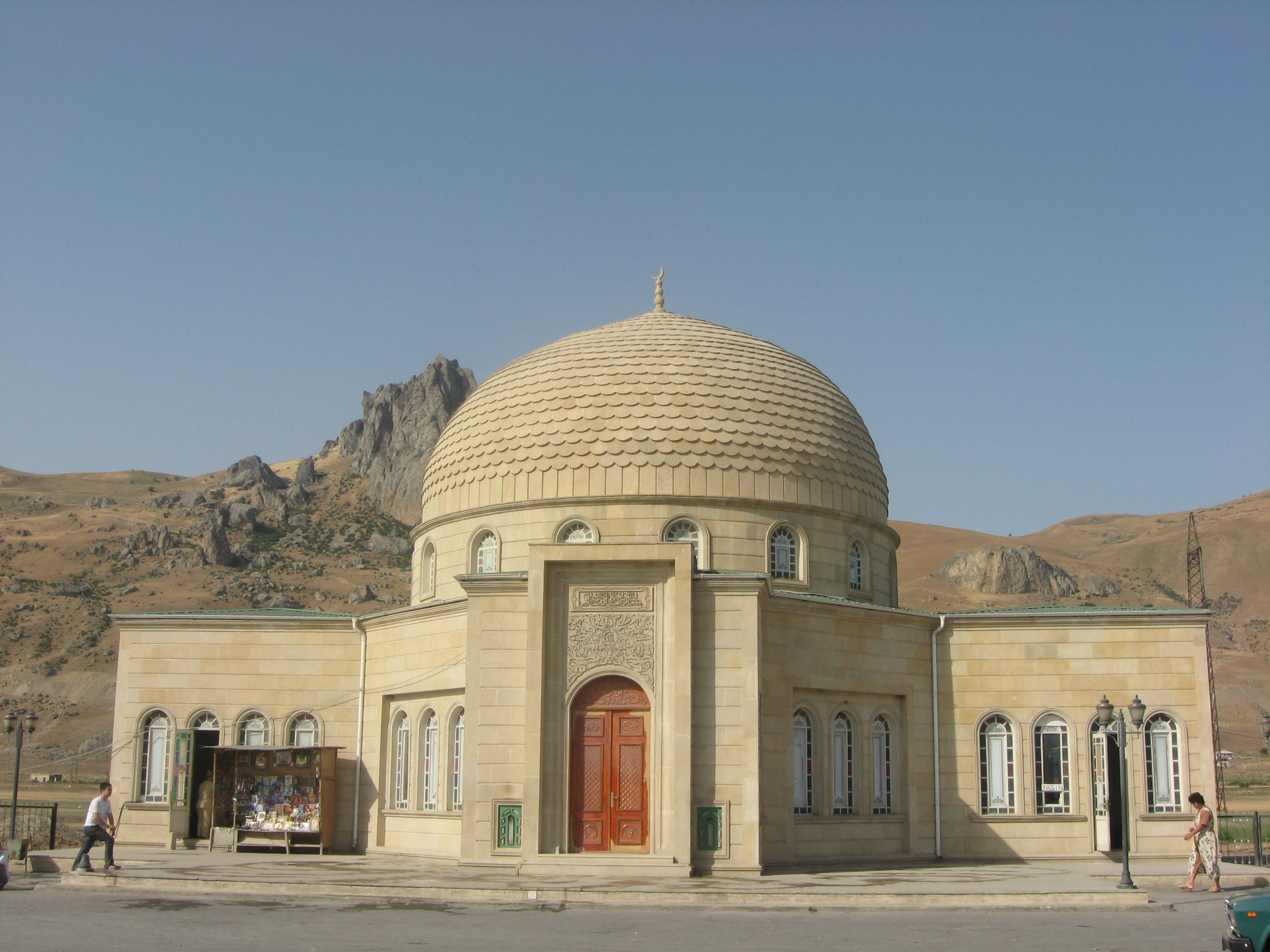 Temple under Beshbarmaq mountain in Azerbaijan